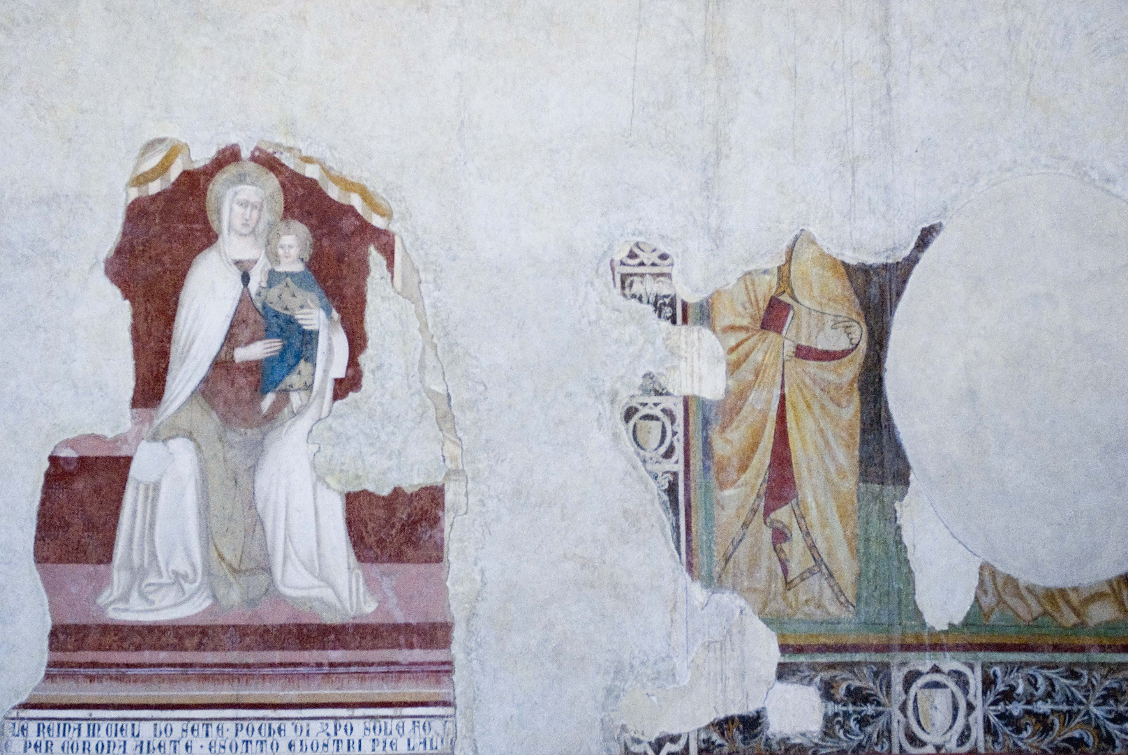 Madonna col Bambino, affresco , chiesa i santa lucia al borghetto, Tavarnelle Val di Pesa